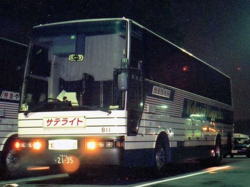 Kokusai Kogyo 811 "Satellite" Isuzu P-LV719R at Ashigara Service Area